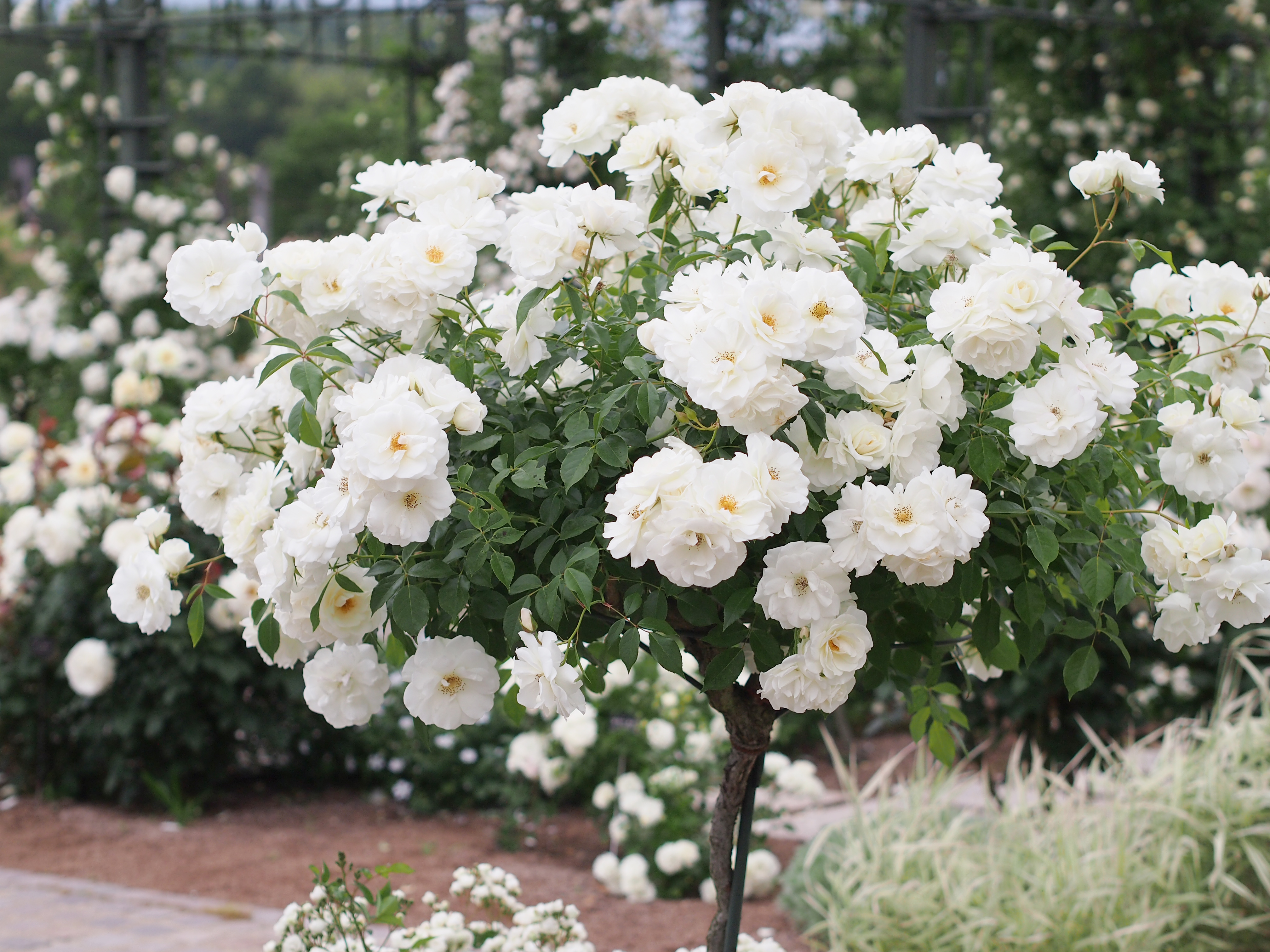 Rose,Iceberg,バラ,アイスバーグ, Floribunda rose フロリバンダ Germany ドイツ Kordes 1958